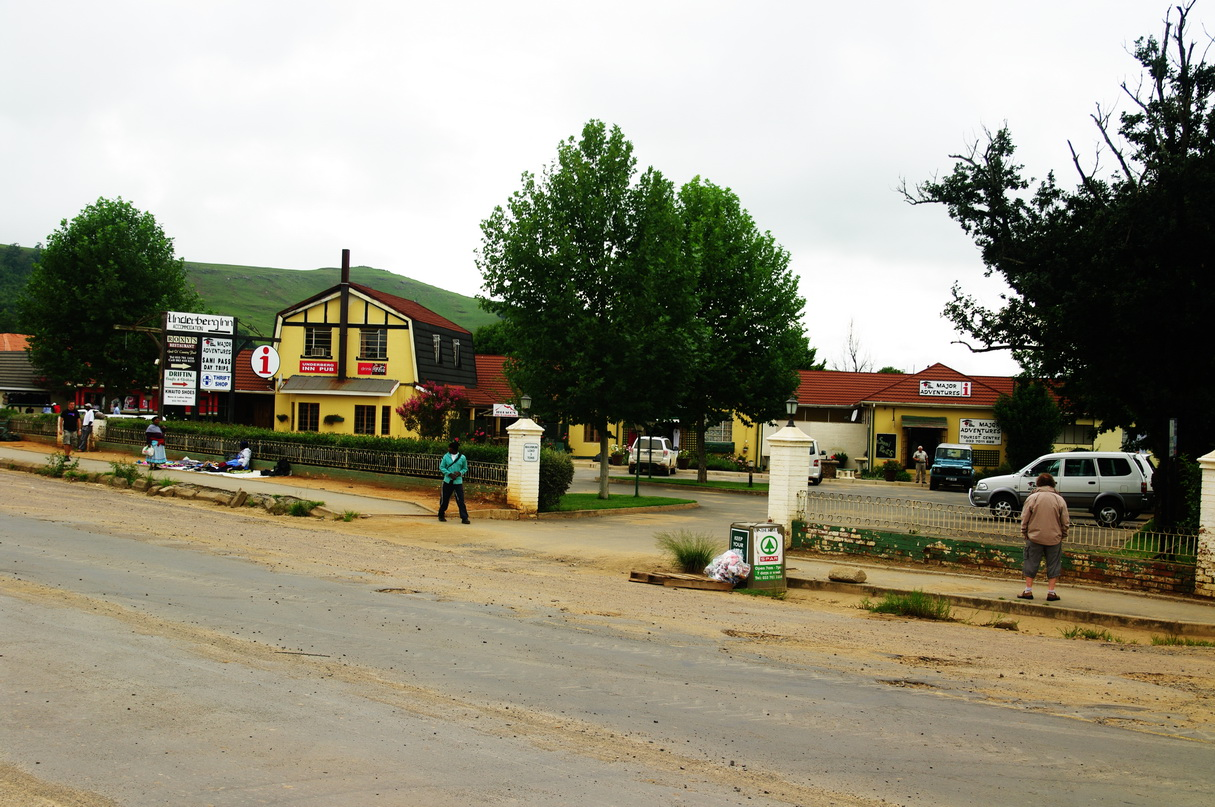 Underberg, Hauptstraße